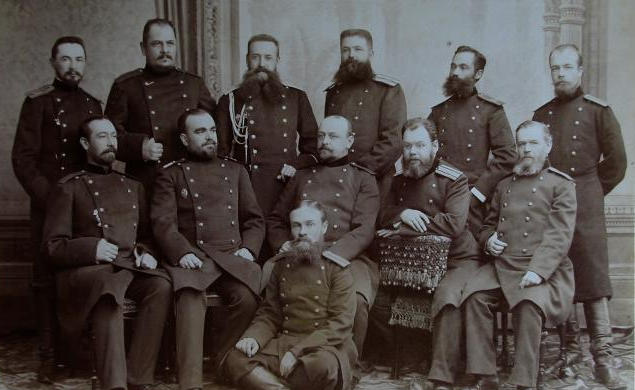 Павло Платонович Потоцький серед викладачів та слухачів офіцерської артшколи (1896)